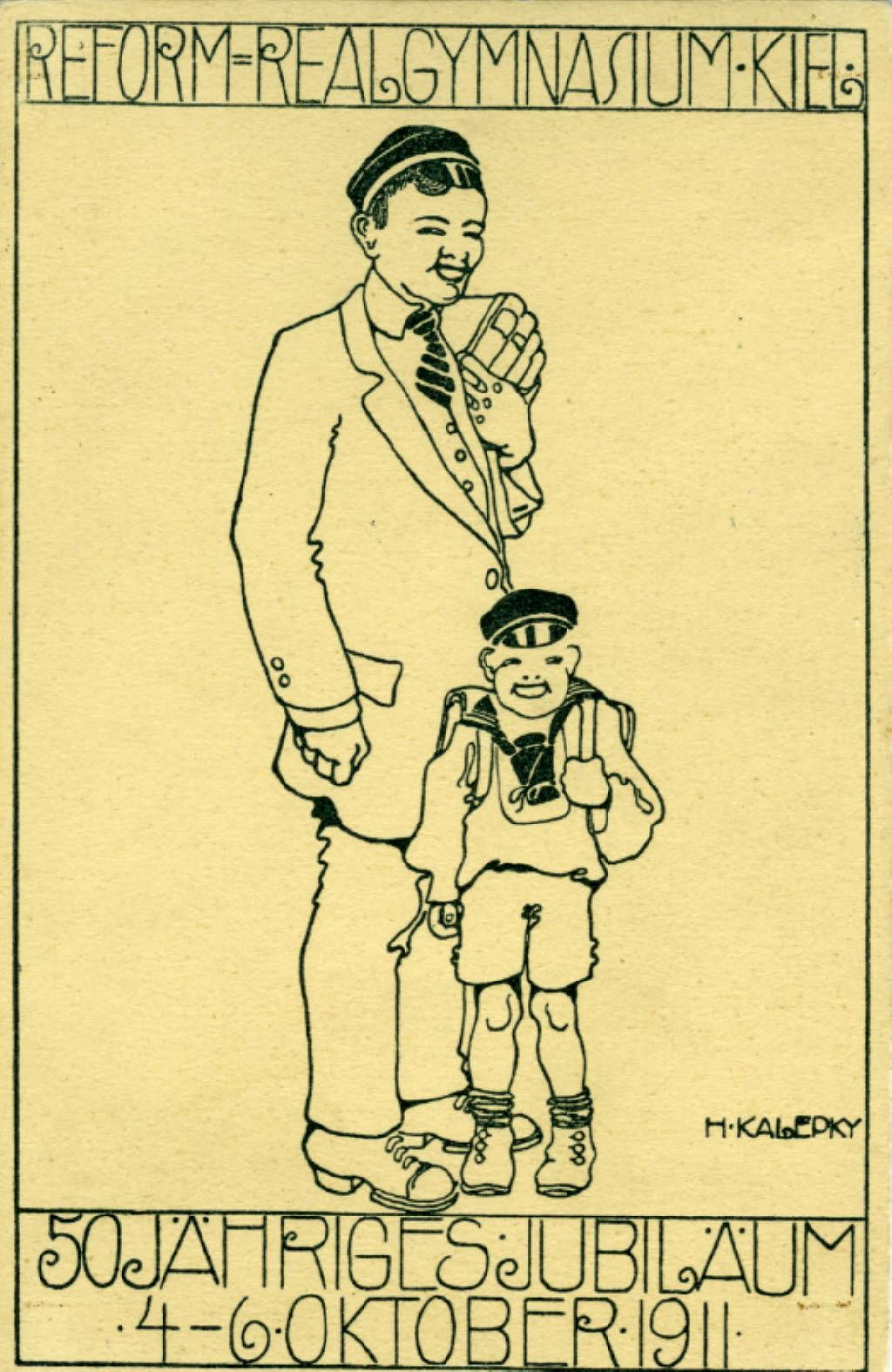 50 jähriges Jubiläum (04.-06.10.1911) des Reform-Realgymnasium (heute Humboldt-Schule) Kiel